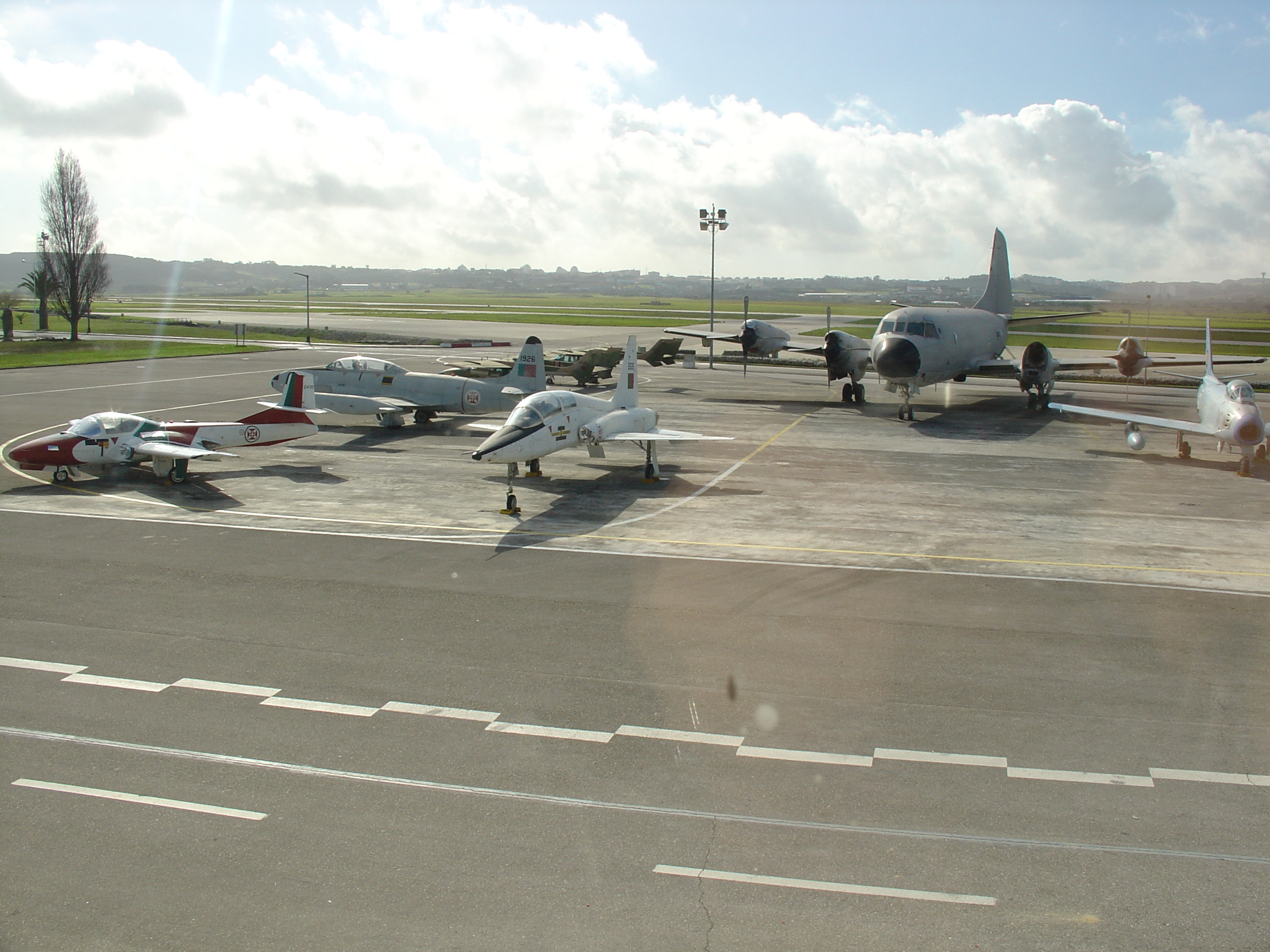 Museu do Ar